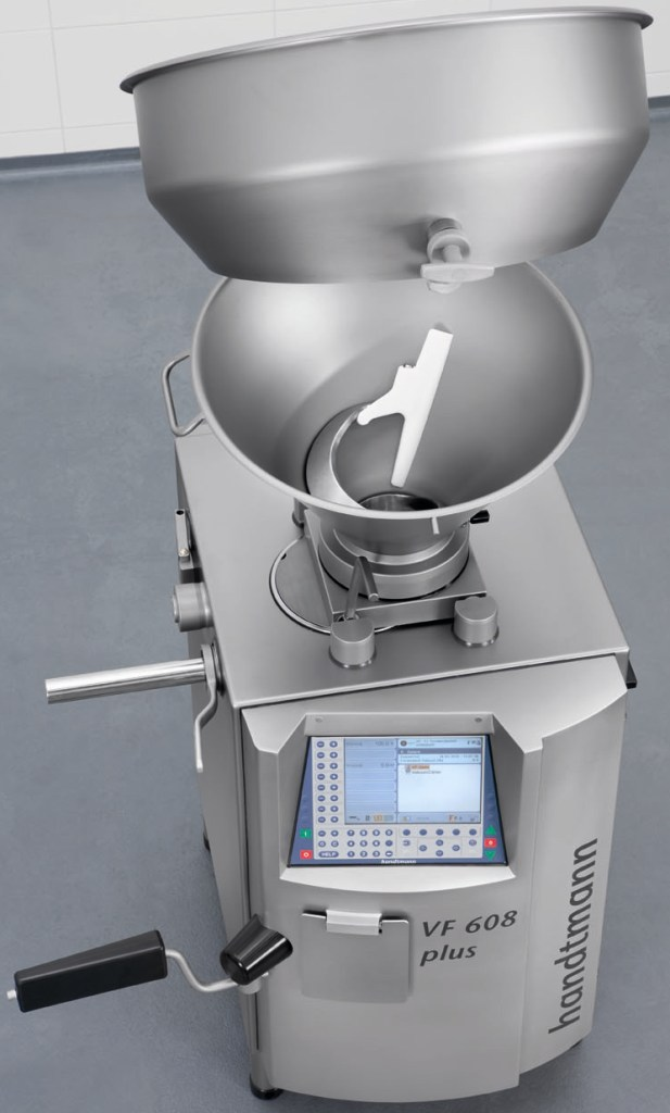 Trichter mit mechanischer Zubringerkurve